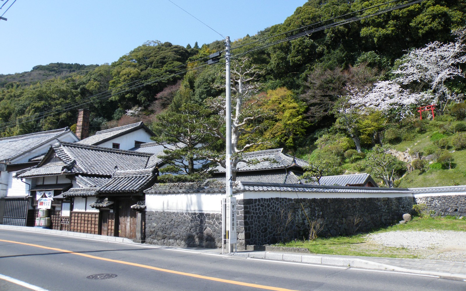 江迎本陣跡（長崎県江迎町）